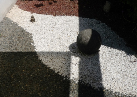 Parque escultórico con figuras precolombinas en una interpretación de su cosmogonía, ubicada en Valdesol, Heredia, Costa Rica, obra de Rafa Víquez